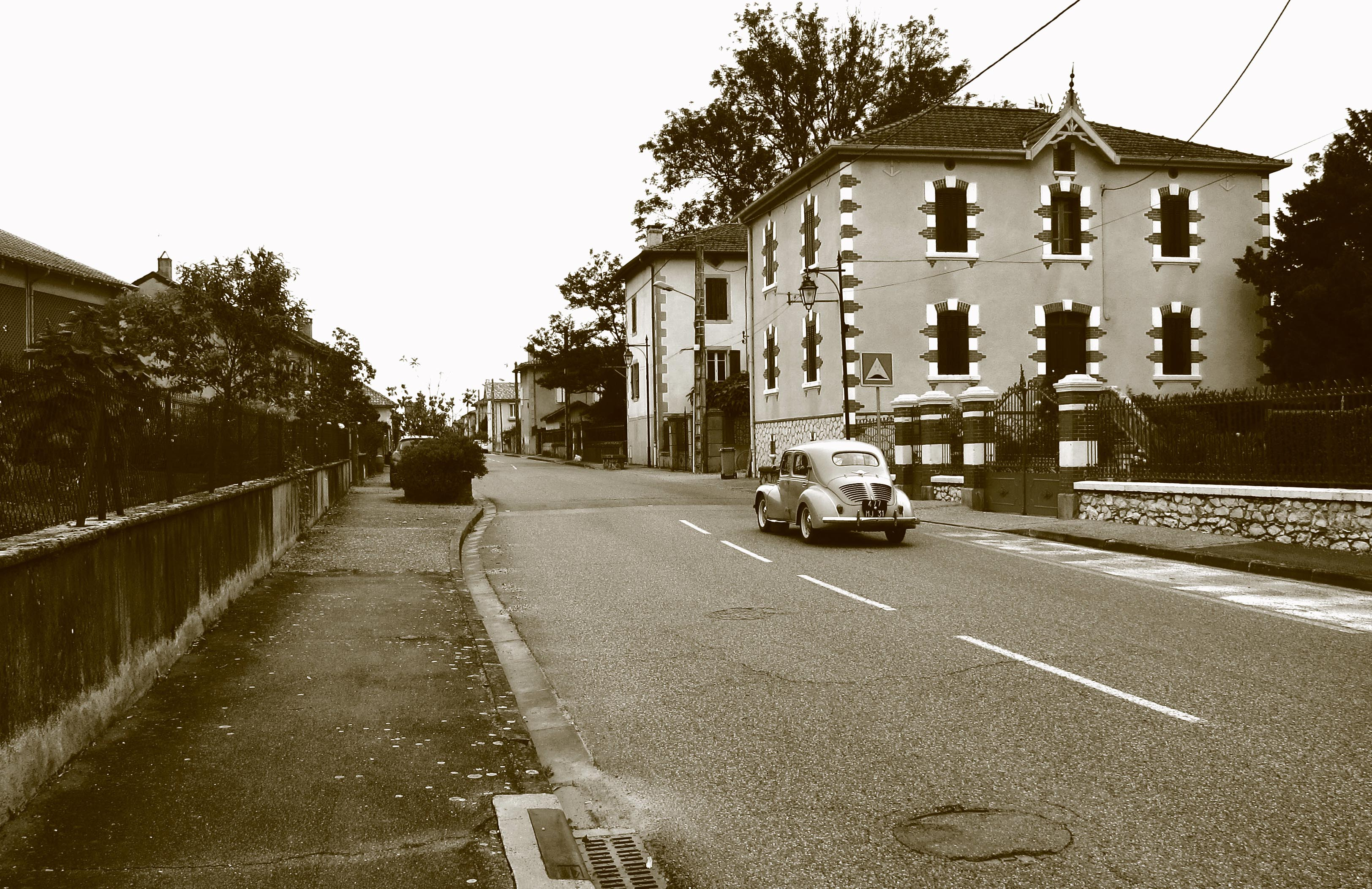 Mazères-sur-Salat (Haute-Garonne, Midi-Pyrénées, France) - Rue Marcel Loubens.